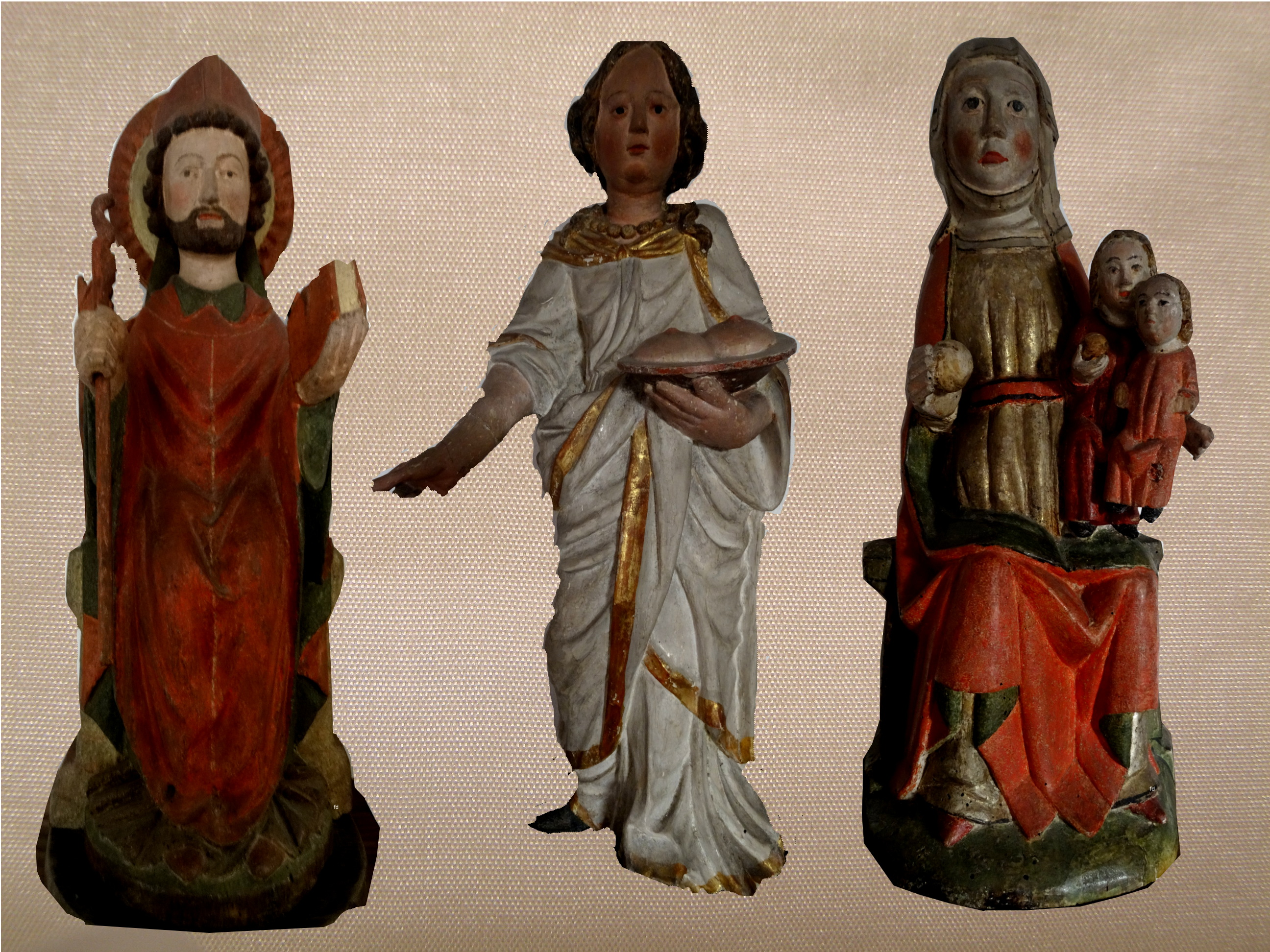 3 der in dem Artikel beschriebenen Figurten.